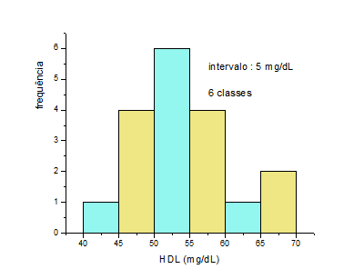 Histograma : Exemplo de um grupo de amostras de HDL coletadas de 18 pacientes com intervalo de 5 mg/dL e 6 classes